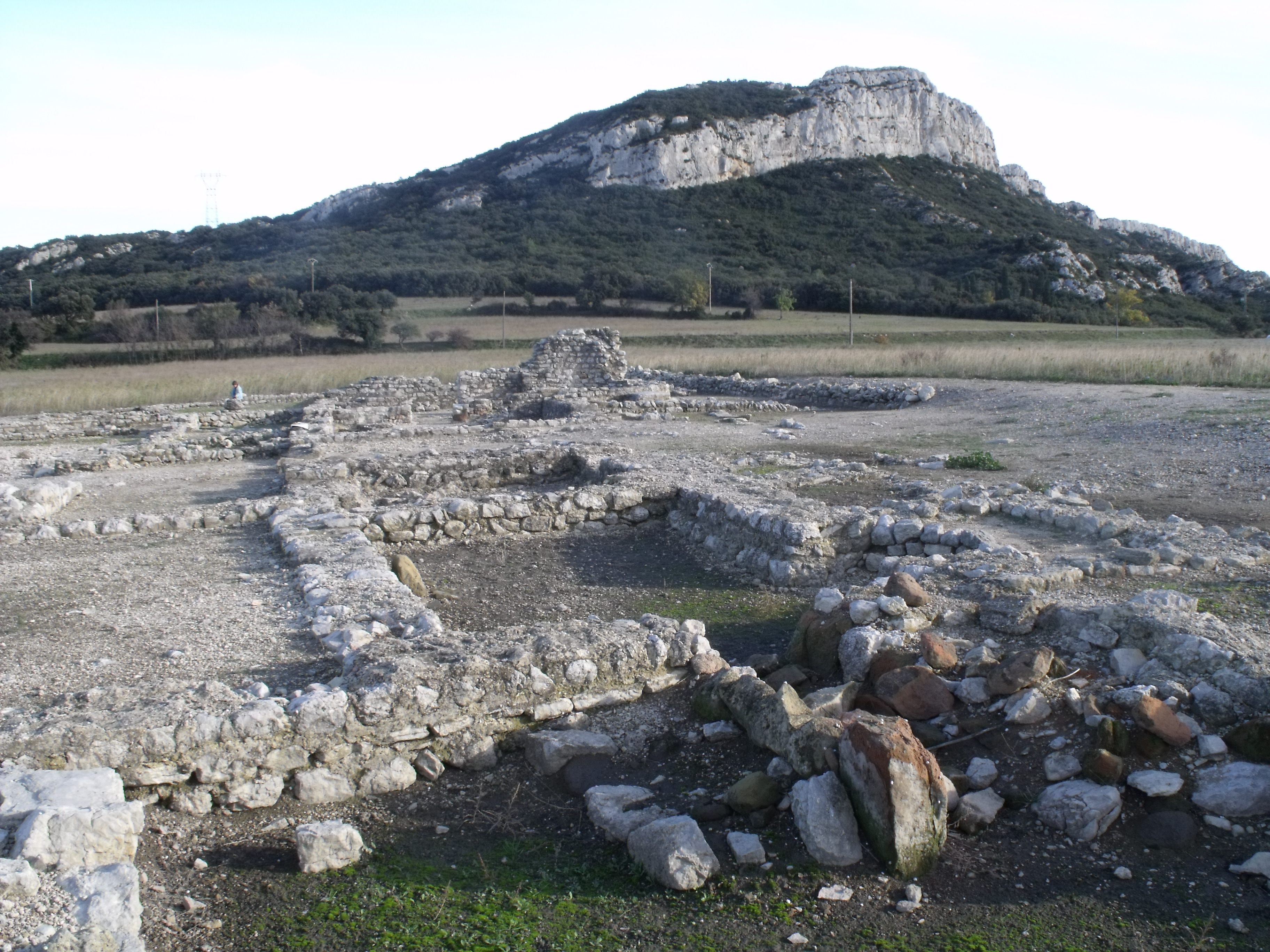 Villa gallo-romaine de Saint-Pierre de Vence, à Eyguières (Bouches-du-Rhône).